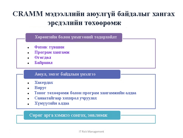 Монгол: Эрсдэлийн төхөөрөмж